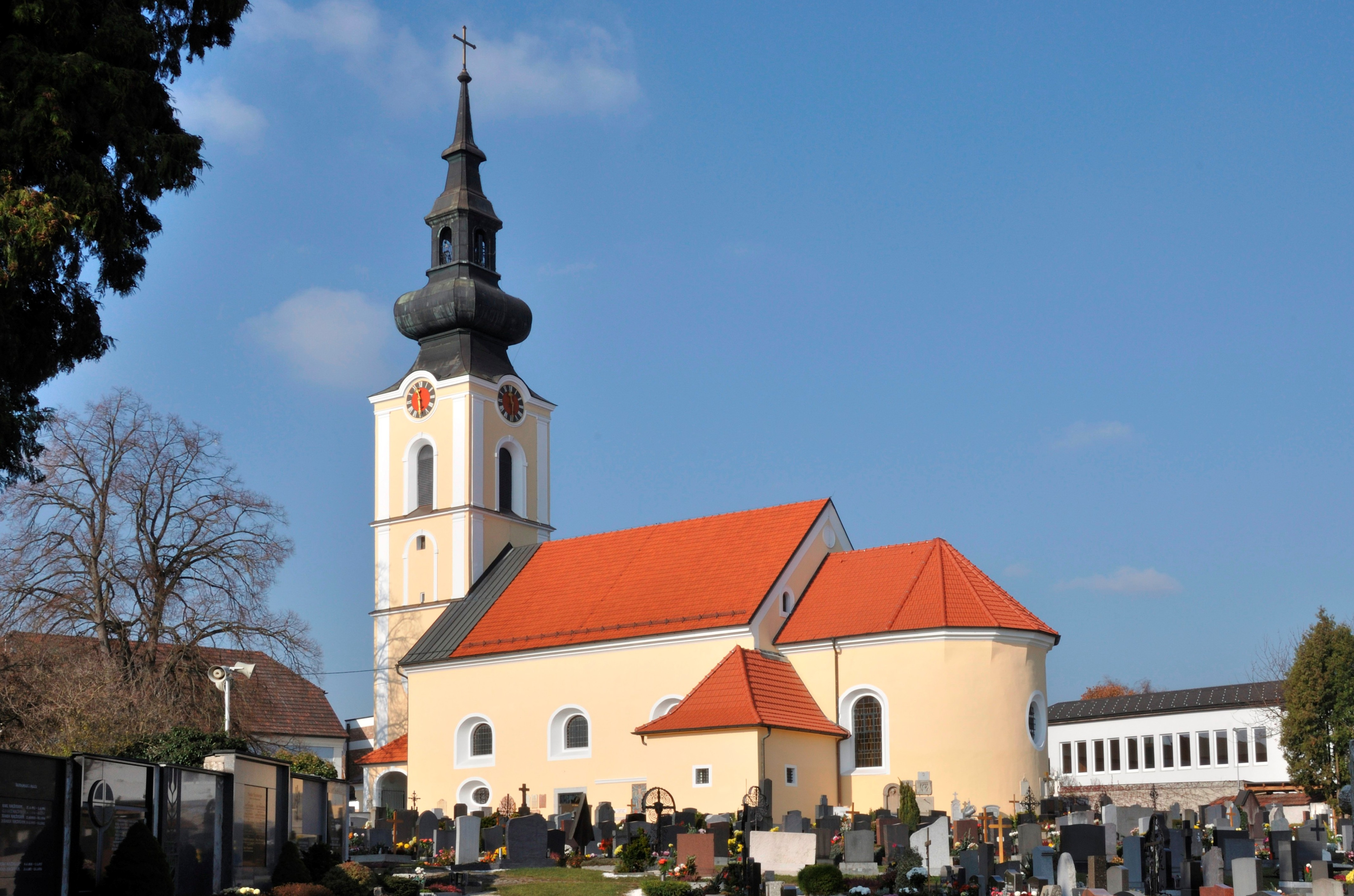 Kath. Pfarrkirche hl. Michael mit Fried- und Kirchhof, Kriegerdenkmal